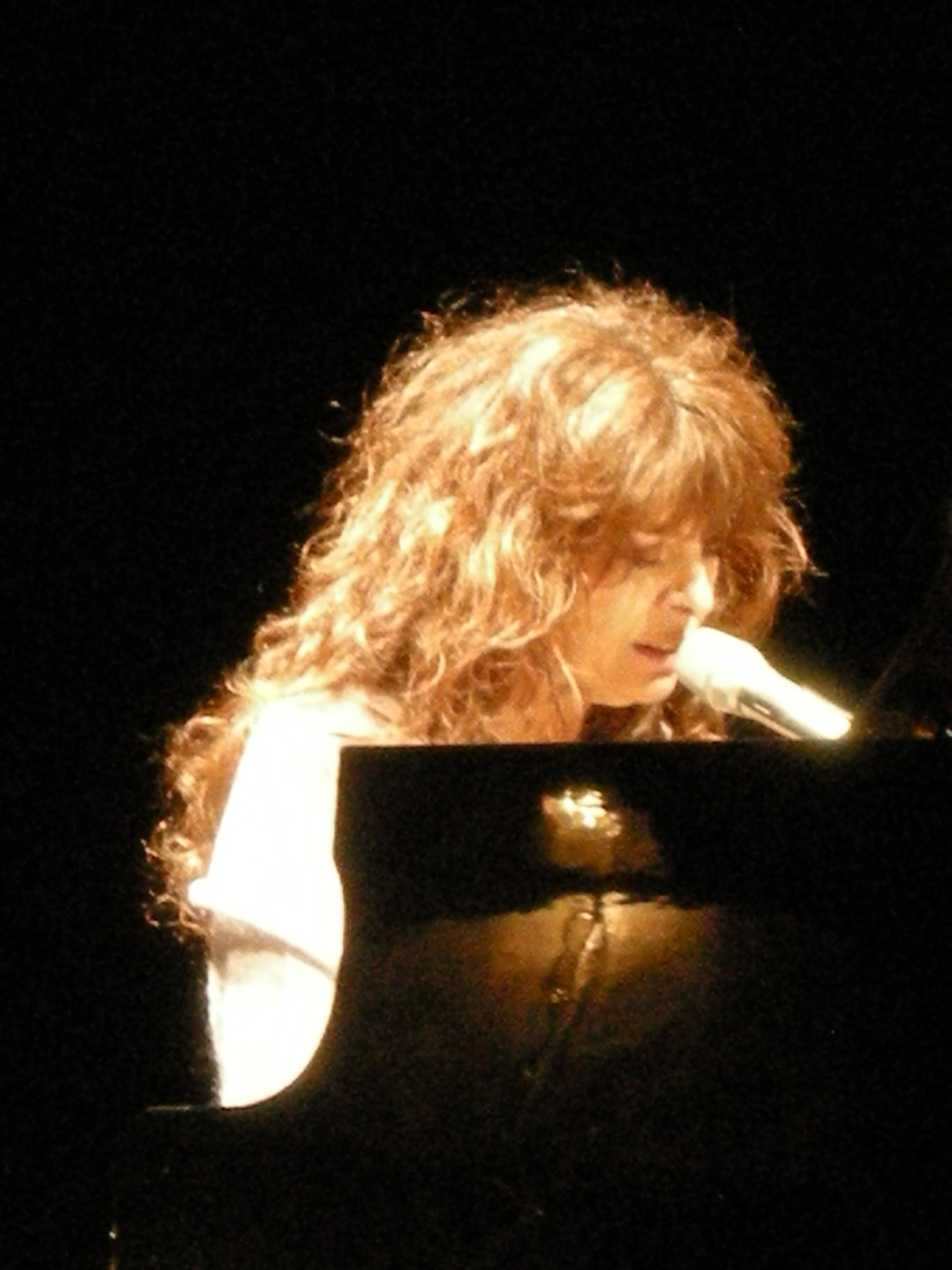 Alice @ Prato 20-03-09, 02